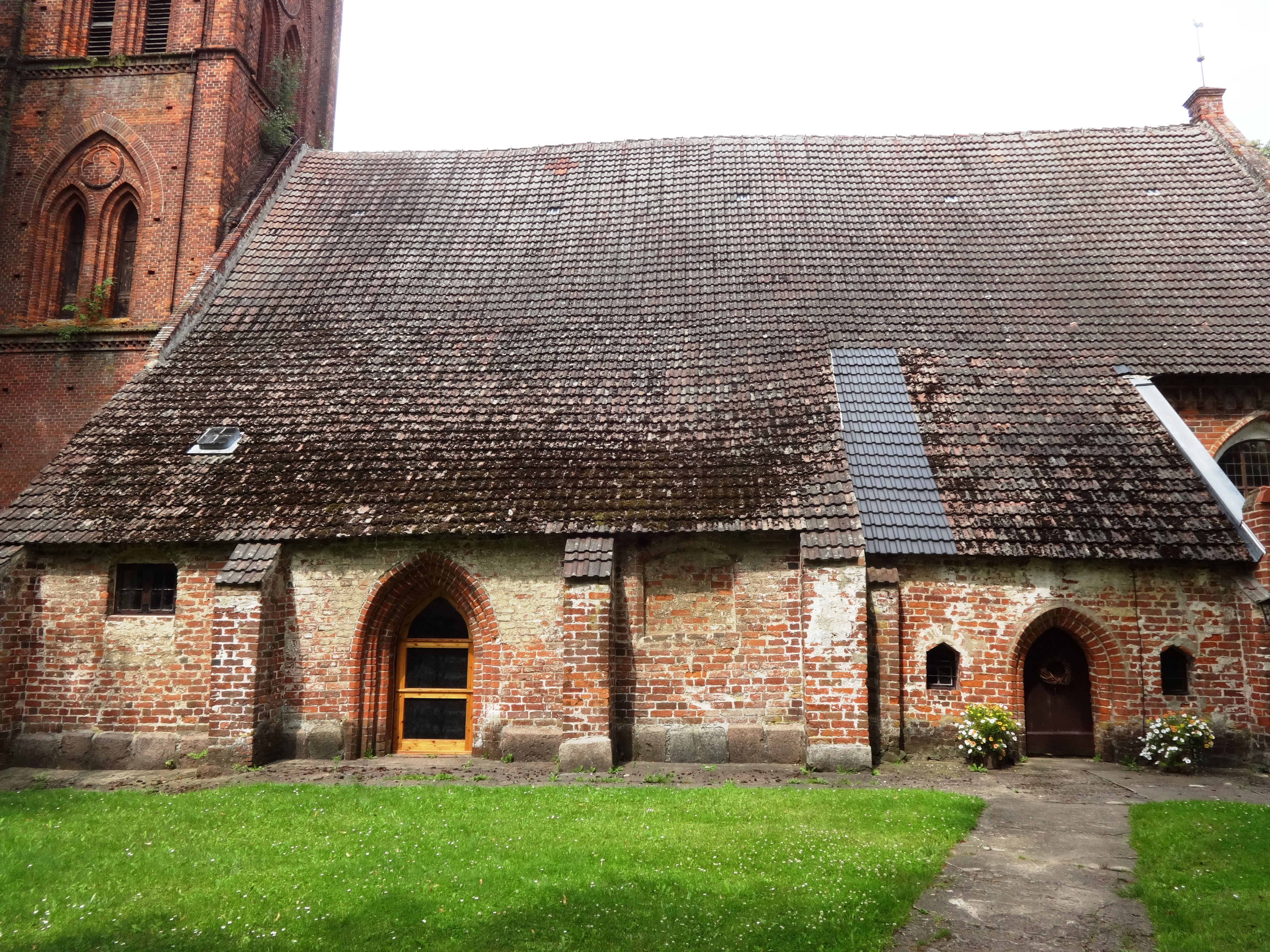 Heilig-Kreuz-Kirche, gotische Hallenkirche bei Greifswald, Landkreis Vorpommern-Greifswald in Mecklenburg-Vorpommern